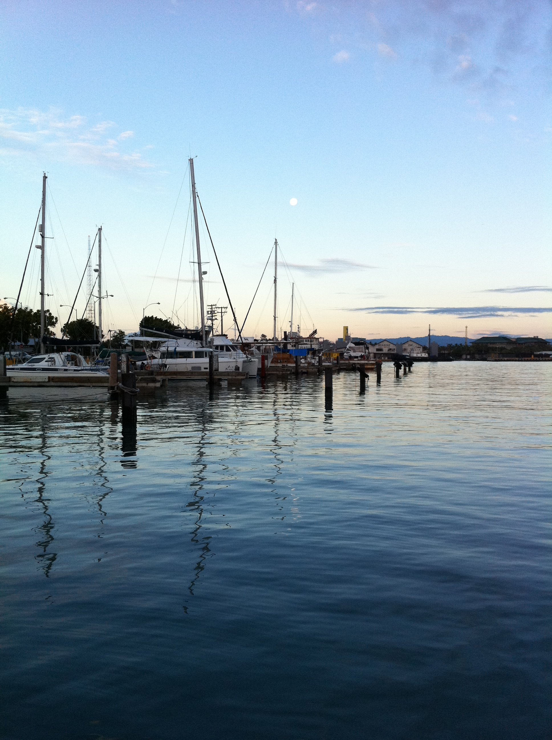 Full Moon